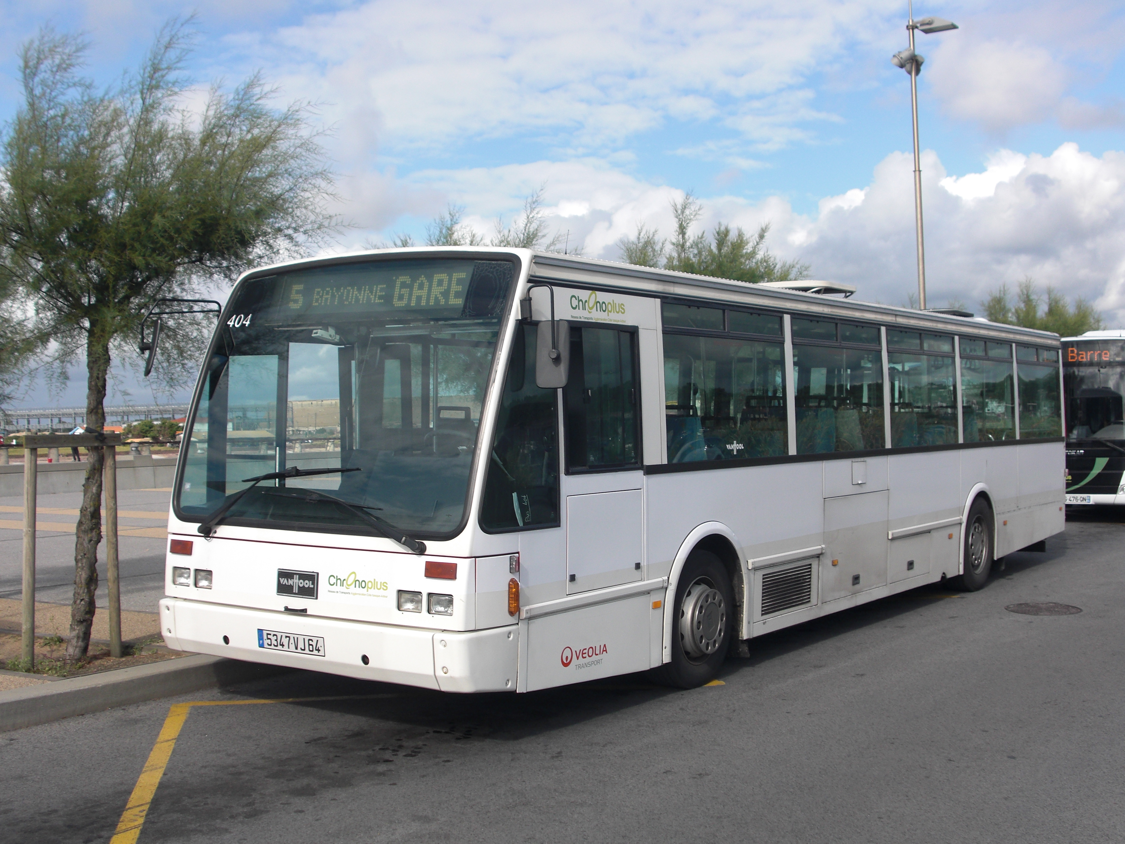 Photo d'un bus du Résau Chronoplus sur la ligne 5 au terminus "Anglet La Barre".